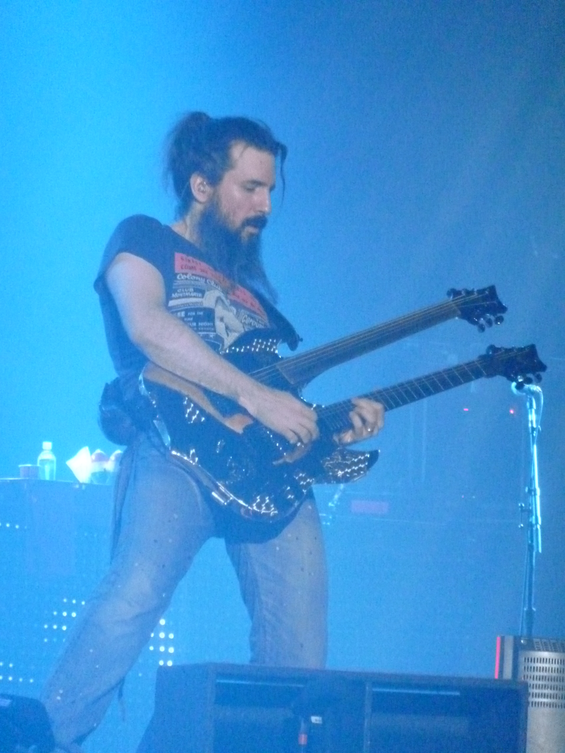 "Guns N' Roses" Chile 2011 Guns Roses Axl